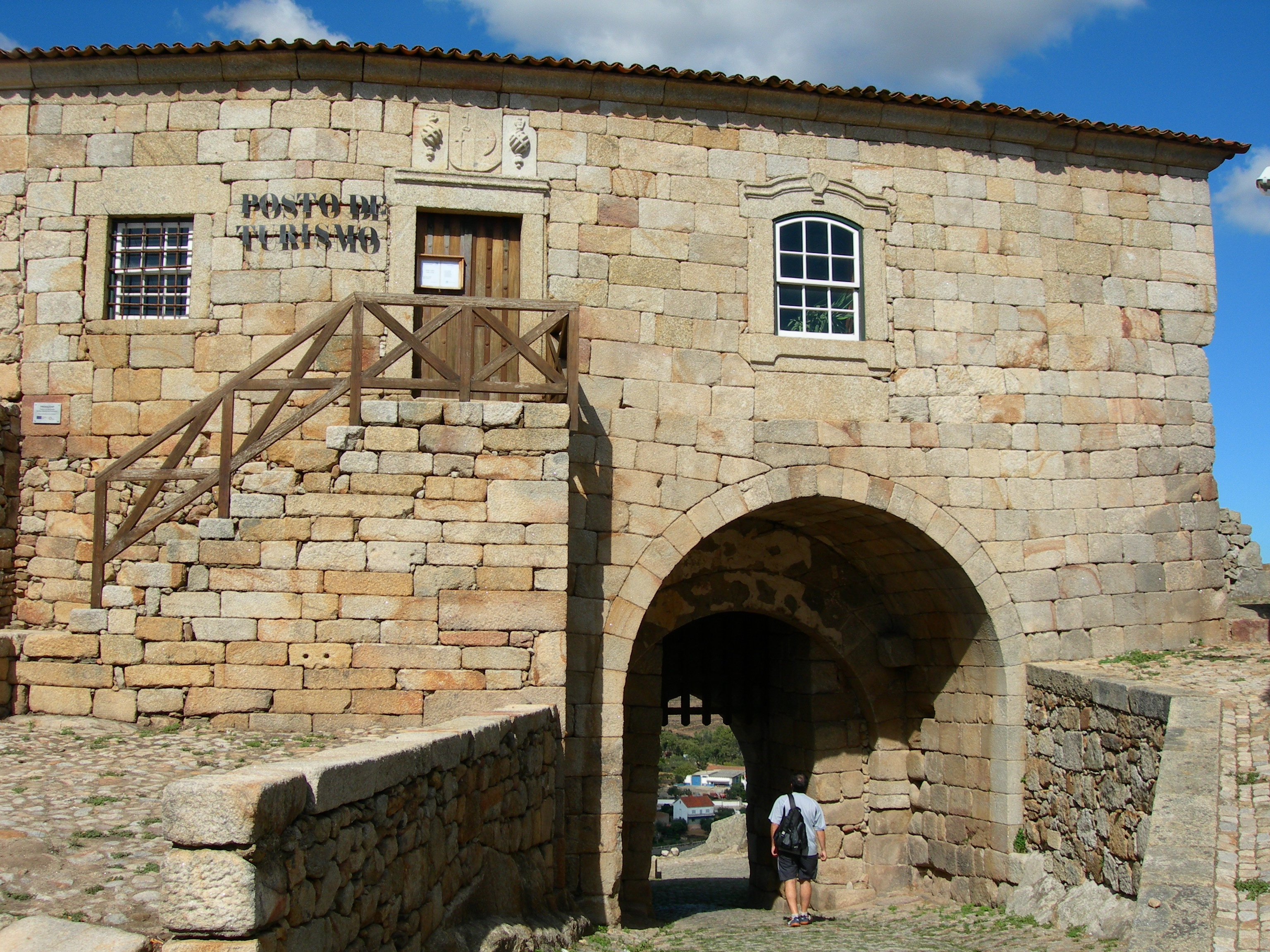 POSTO DE TURISMO (PENAMACOR) This file was uploaded for Wiki Loves Monuments in Portugal with the unique identifier 73056.